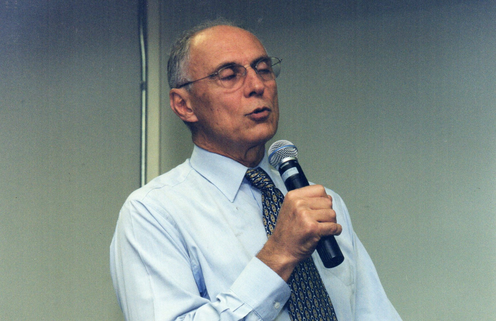 Eduardo Suplicy em palestra. Auditório da Faculdade Cásper Líbero. Março de 2003. Fotógrafa: Evelyn Carvalho Teixeira